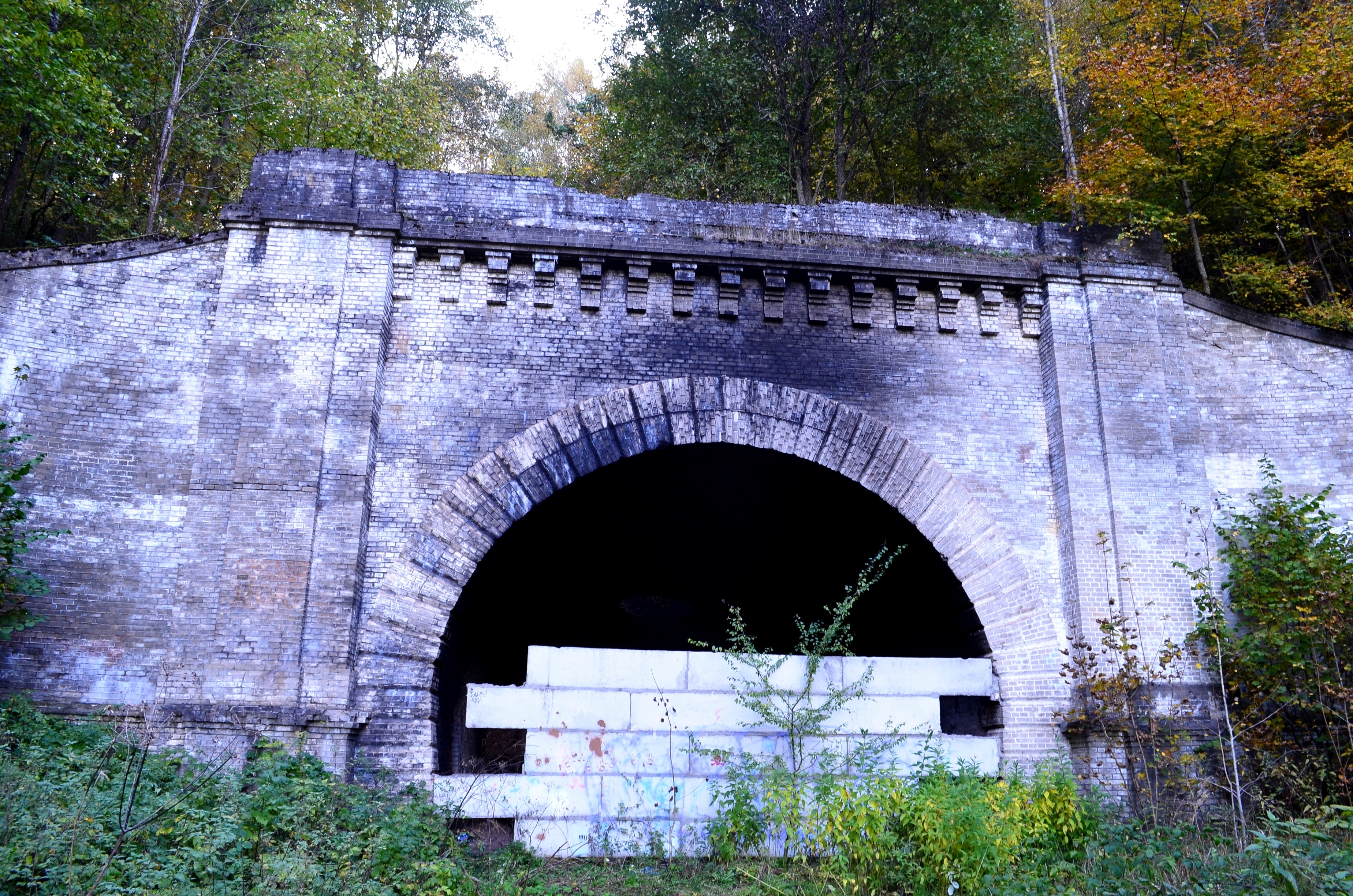 Panerių tunelis, Aukštieji Paneriai, Vilnius